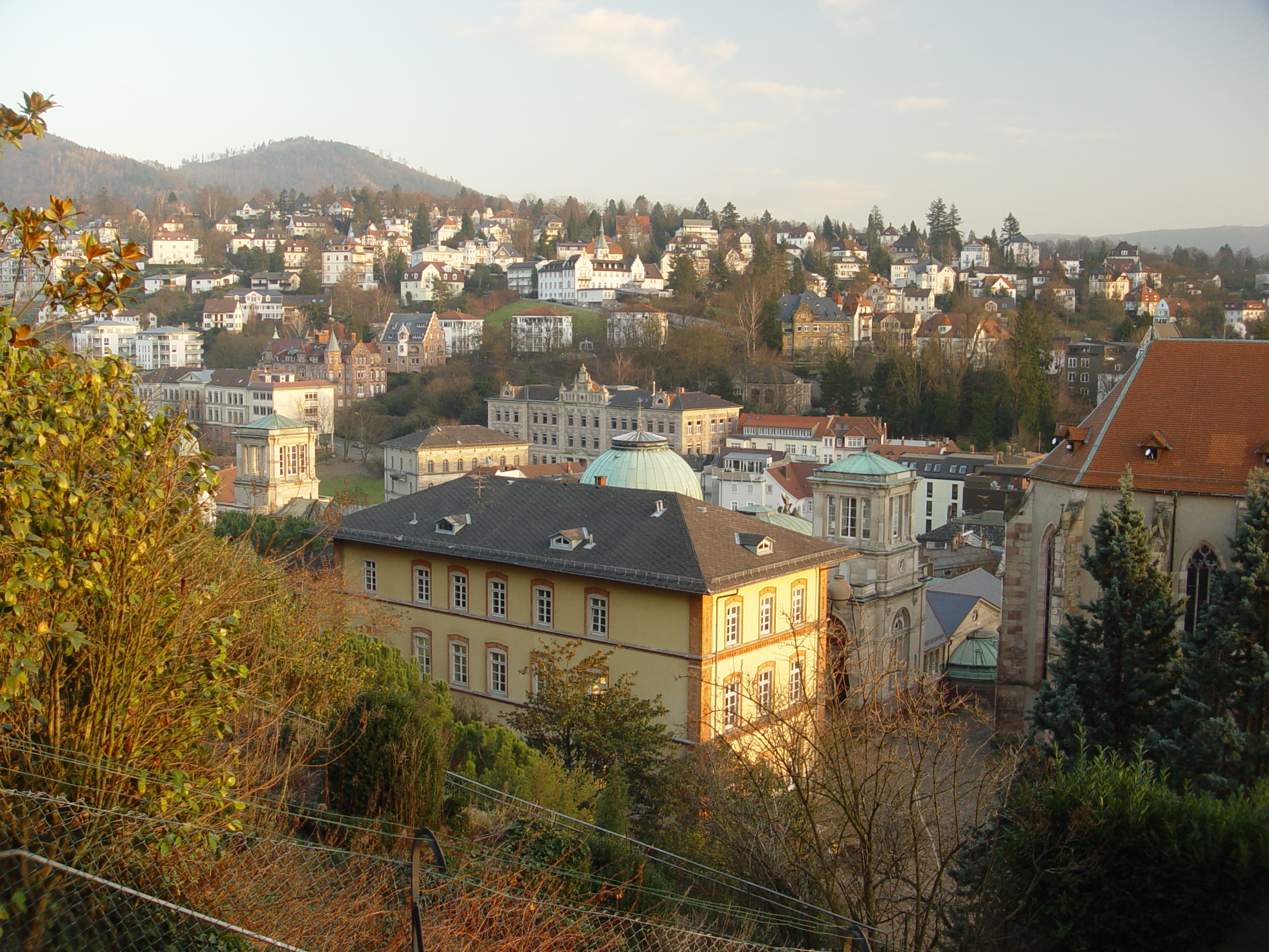 Altes Dampfbad in Baden-Baden. Rechts ist ein Stück der Stiftskirche zu sehen, hinter dem Alten Dampfbad sieht man das Friedrichsbad.